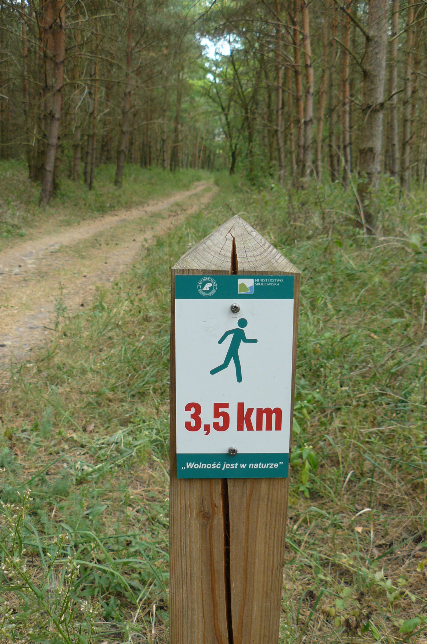 Trasa biegowa Wolność jest w naturze - Łysy Młyn koło Poznania.